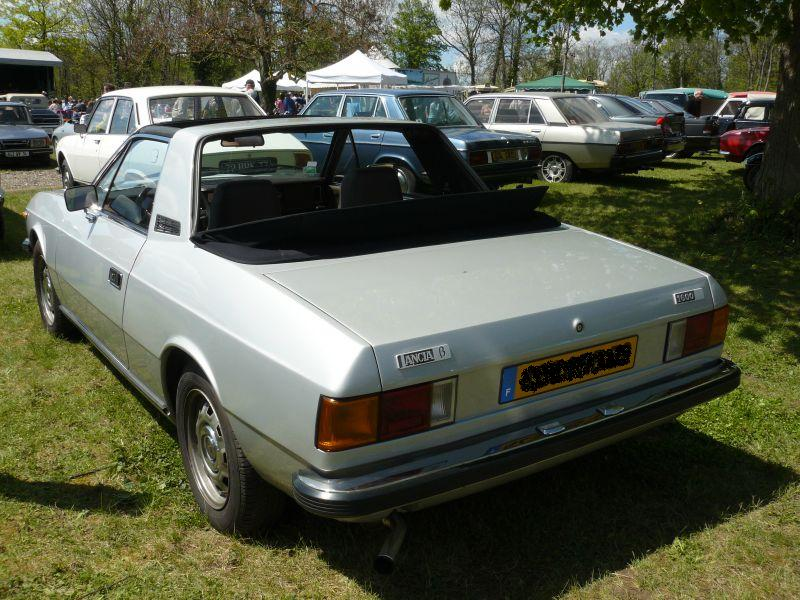 Photo prise le 1er Mai 2012 à Chelles.